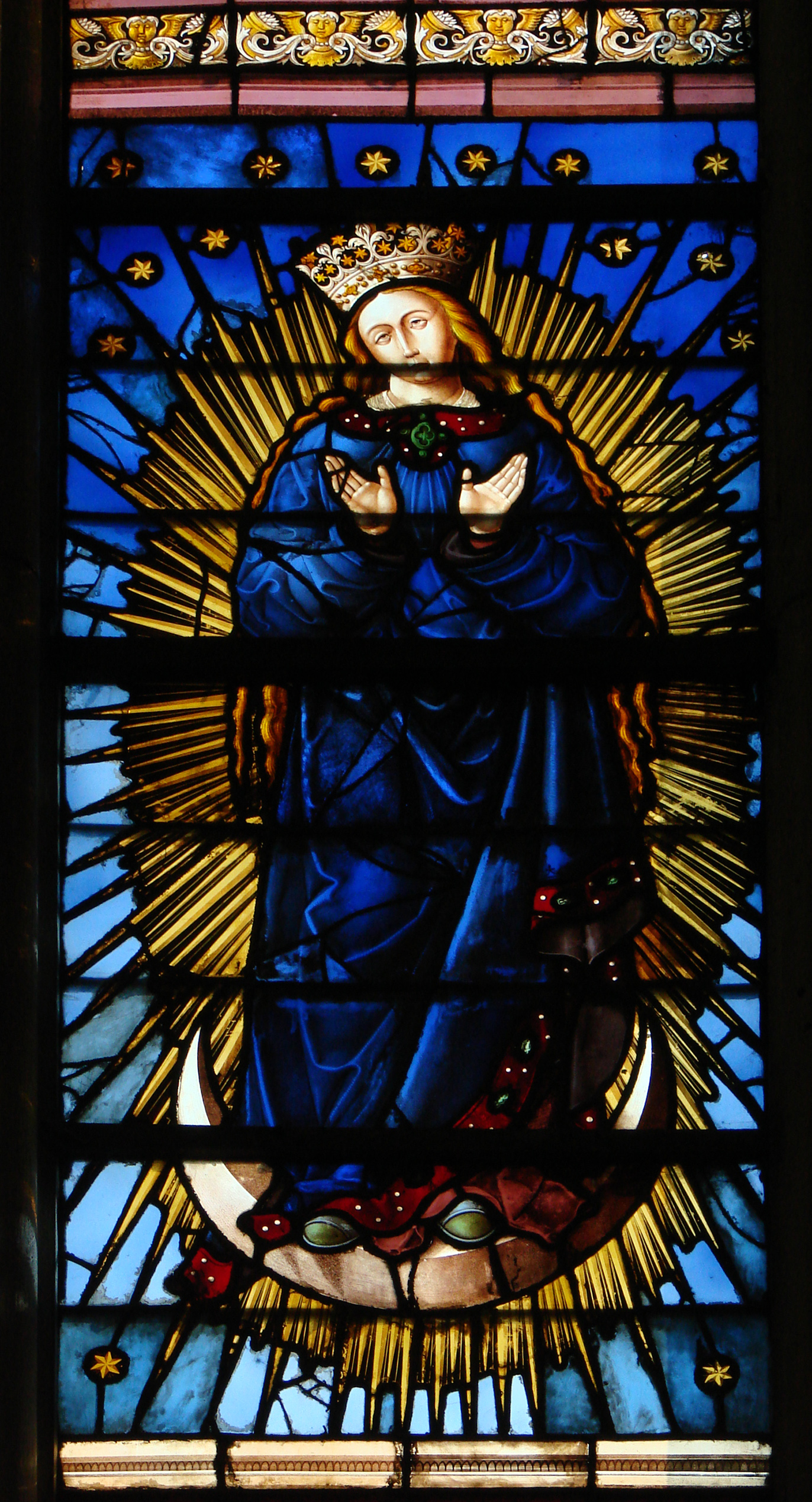 Vitrail de Jean Soudain, 1524, représentant "la Vierge selon l'Apocalypse" (en fait,associant la description de l'Apocalypse de Jean avec des éléments de représentation de la Vierge Marie). Texte de l'Apocalypse de Jean (12,1):"Un signe grandiose apparut au ciel: une Femme! le soleil l'enveloppe, la lune est sous ses pieds et douze étoiles couronnent sa tête; elle est enceinte et crie dans les douleurs et le travail de l'enfantement." Cathédrale Saint-Pierre-et-Saint-Paul de Troyes.